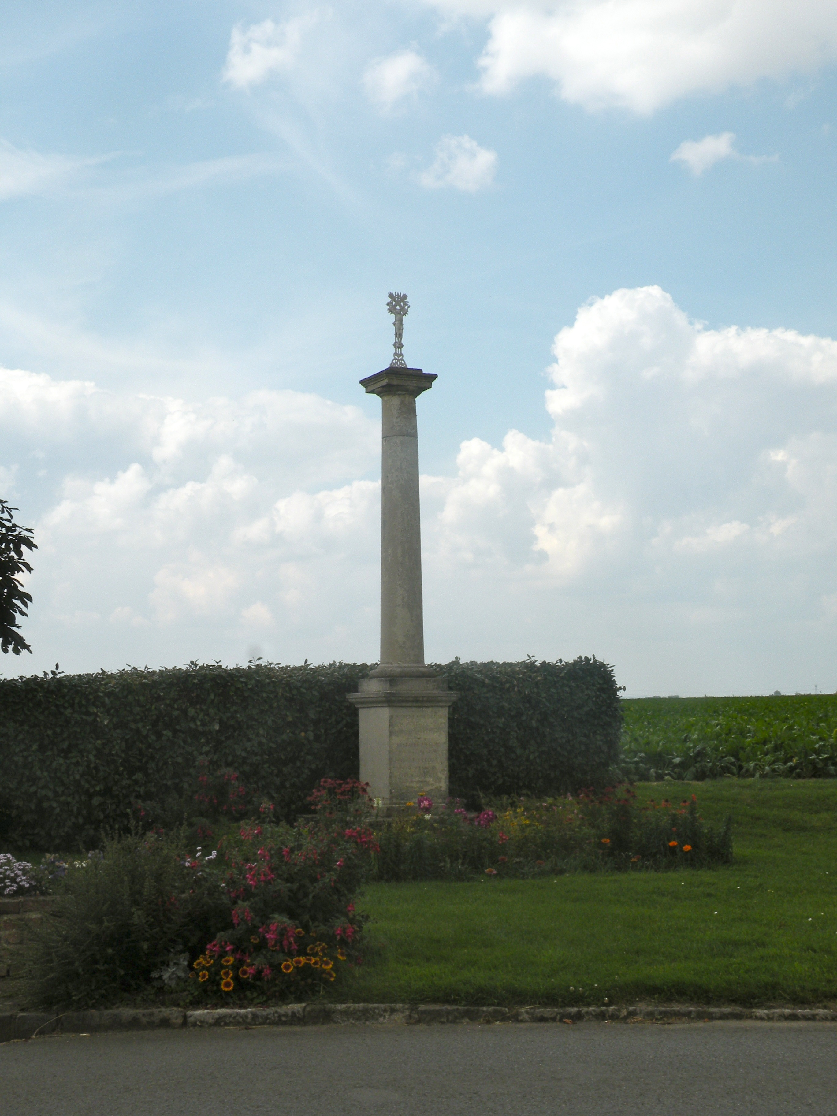 Rémérangles calvaire sortie sud